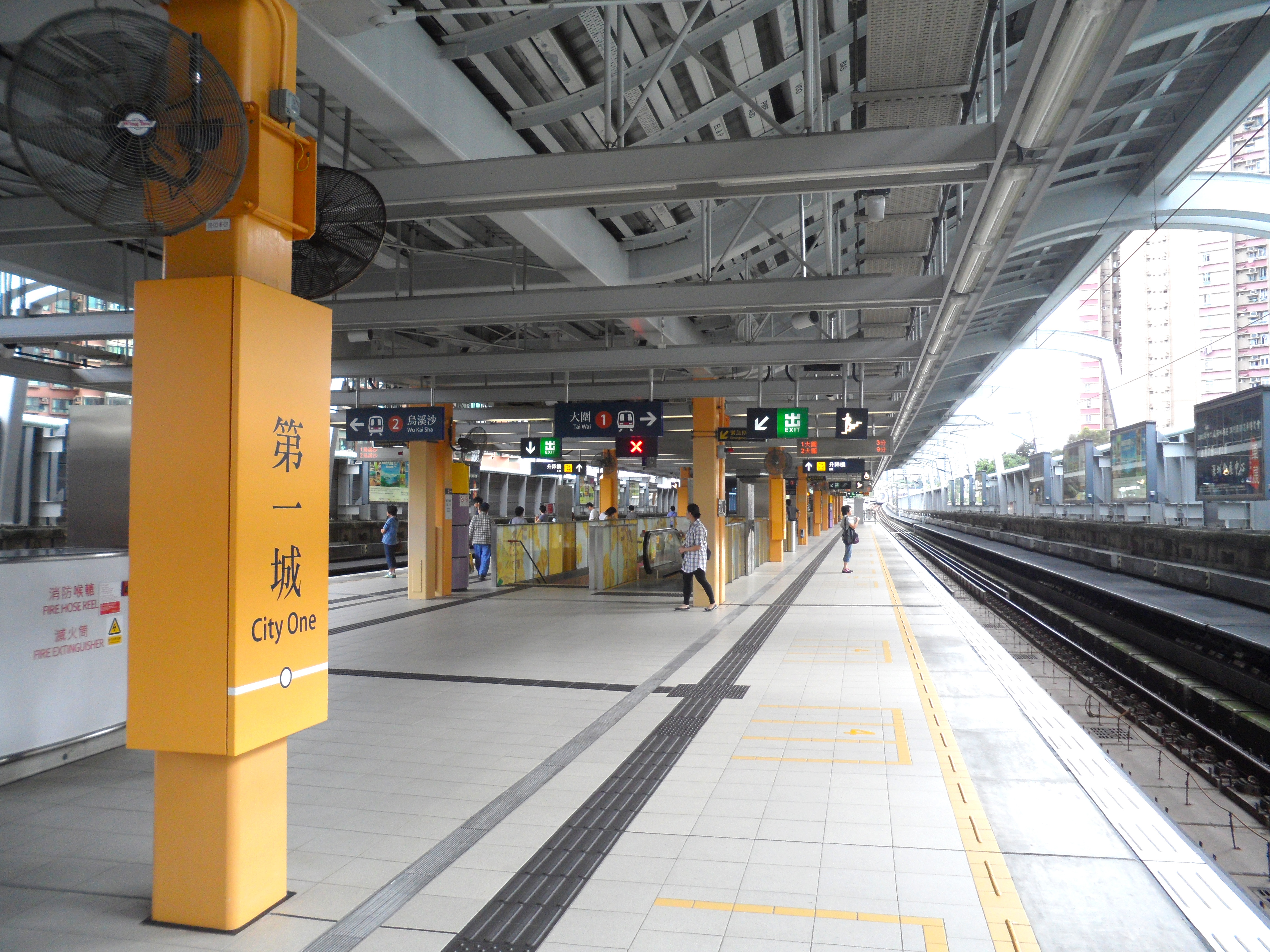 港鐵第一城站一號月台